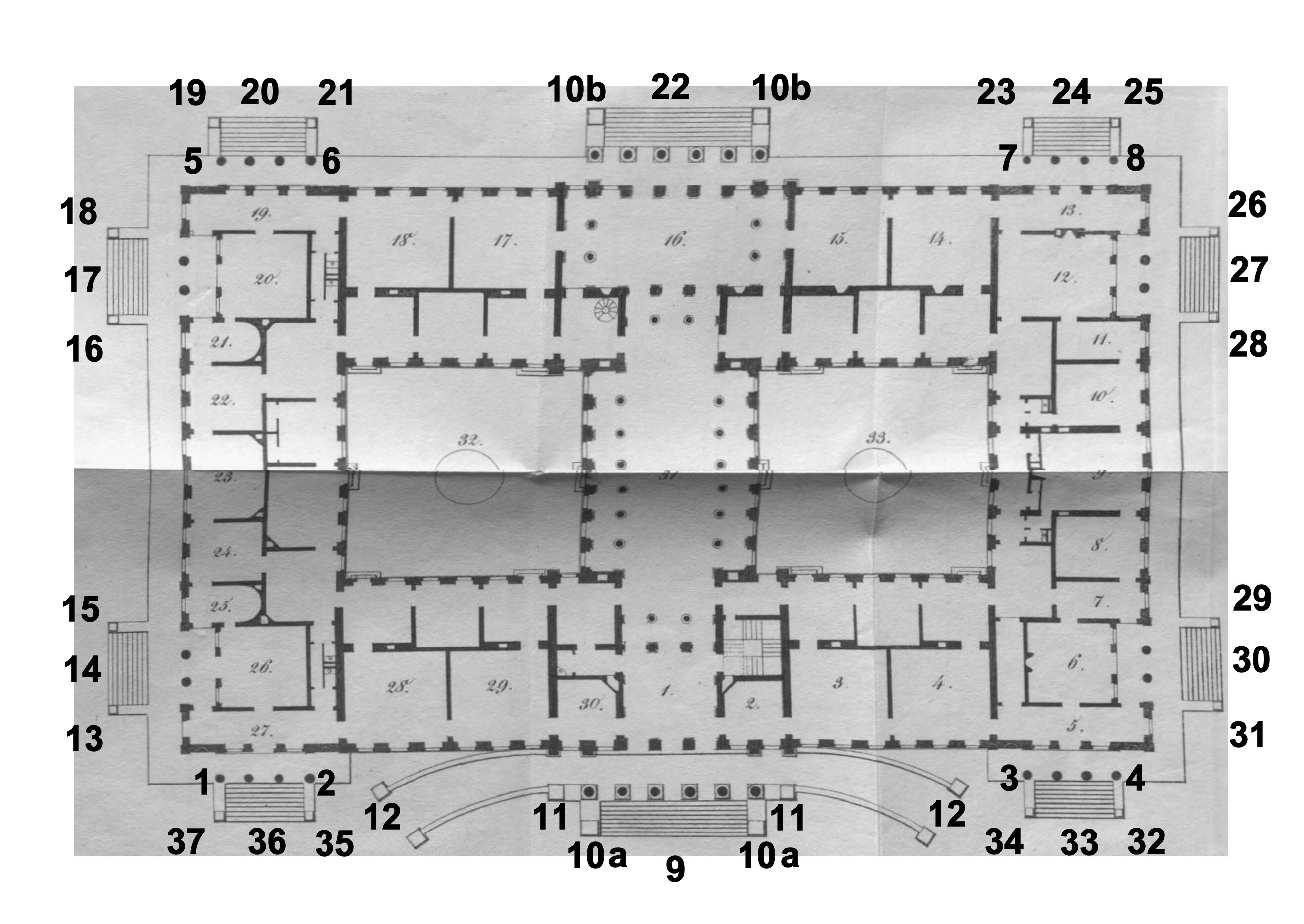 Lageplan der Fassadenplastik an Schloss Rosenstein in Stuttgart. Musen 1 Klio2 Terpsichore3 Polyhymnia4 Thalia5 Euterpe6 Kalliope7 Erato8 Urania Große Giebelreliefs 9 Artemis-Selene-Relief22 Helios-Relief Kleine Giebelreliefs 20 Kopf des Neptun24 Kopf der Flora33 Kopf des Apollon36 Kopf der Diana Girlanden-Friese 14, 17, 27, 30 Medaillons 13 Schlafender Knabe15 Knabe mit zwei Fackeln16 Angelnder Knabe18 Mädchen mit Krug19 Knabe auf Delphin21 Knabe auf Delphin23 Knabe mit Füllhorn und Weintraube25 Knabe mit Blumenkörbchen26 Mädchen mit Blumenkränzchen um den Kopf28 Ähren schneidender Knabe29 Knabe mit Maske31 Flöte spielender Knabe32 Knabe mit Pfeil und Bogen34 Knabe mit Leier35 Knabe mit Jagdhund37 Knabe mit Jagdtrophäen Diverse 10 Zwei Löwen11 Zwei Kandelaber12 Vier Kandelaber